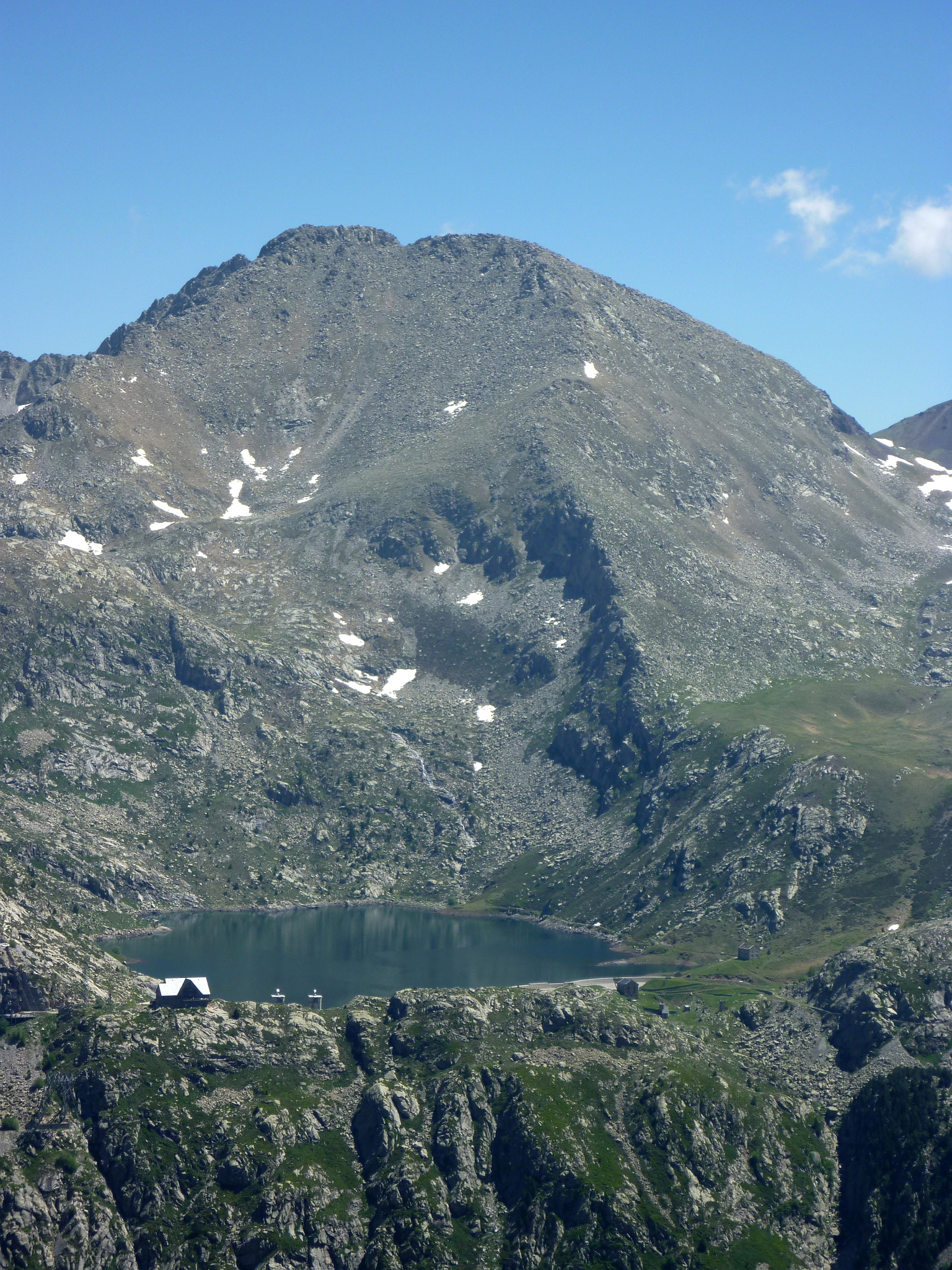 La Pala Pedregosa de Llessui i, sota seu, l'Estany Gento. Foto presa des de la collada de Font Sobirana. Vall Fosca (Pallars Jussà - Catalunya)